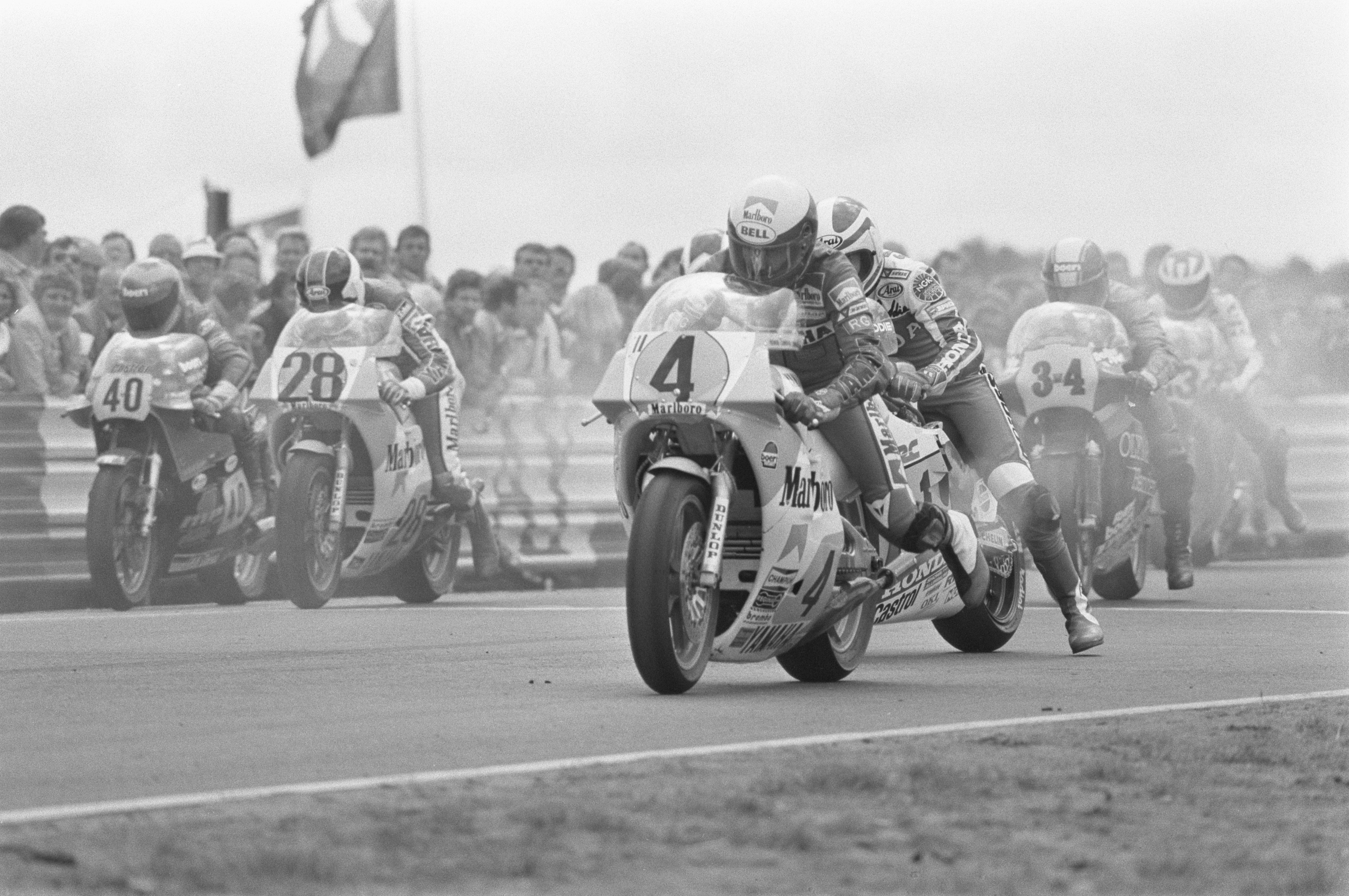 Collectie / Archief : Fotocollectie Anefo Reportage / Serie : TT Assen 1984 Beschrijving : TT van Assen, 500 cc race. Start van de Koningsklasse. Kenny Roberts (4) vertrekt van pole position, vlak achter hem (verscholen) Kenny Lawson Datum : 30 juni 1984 Locatie : Assen Trefwoorden : motorcoureurs, motorfietsen, motorraces, motorsport, sport Persoonsnaam : Lawson, Kenny, Roberts, Kenny Instellingsnaam : TT Fotograaf : Antonisse, Marcel / Anefo Auteursrechthebbende : Nationaal Archief Materiaalsoort : Negatief (zwart/wit) Nummer archiefinventaris : bekijk toegang 2.24.01.05 Bestanddeelnummer : 933-0189